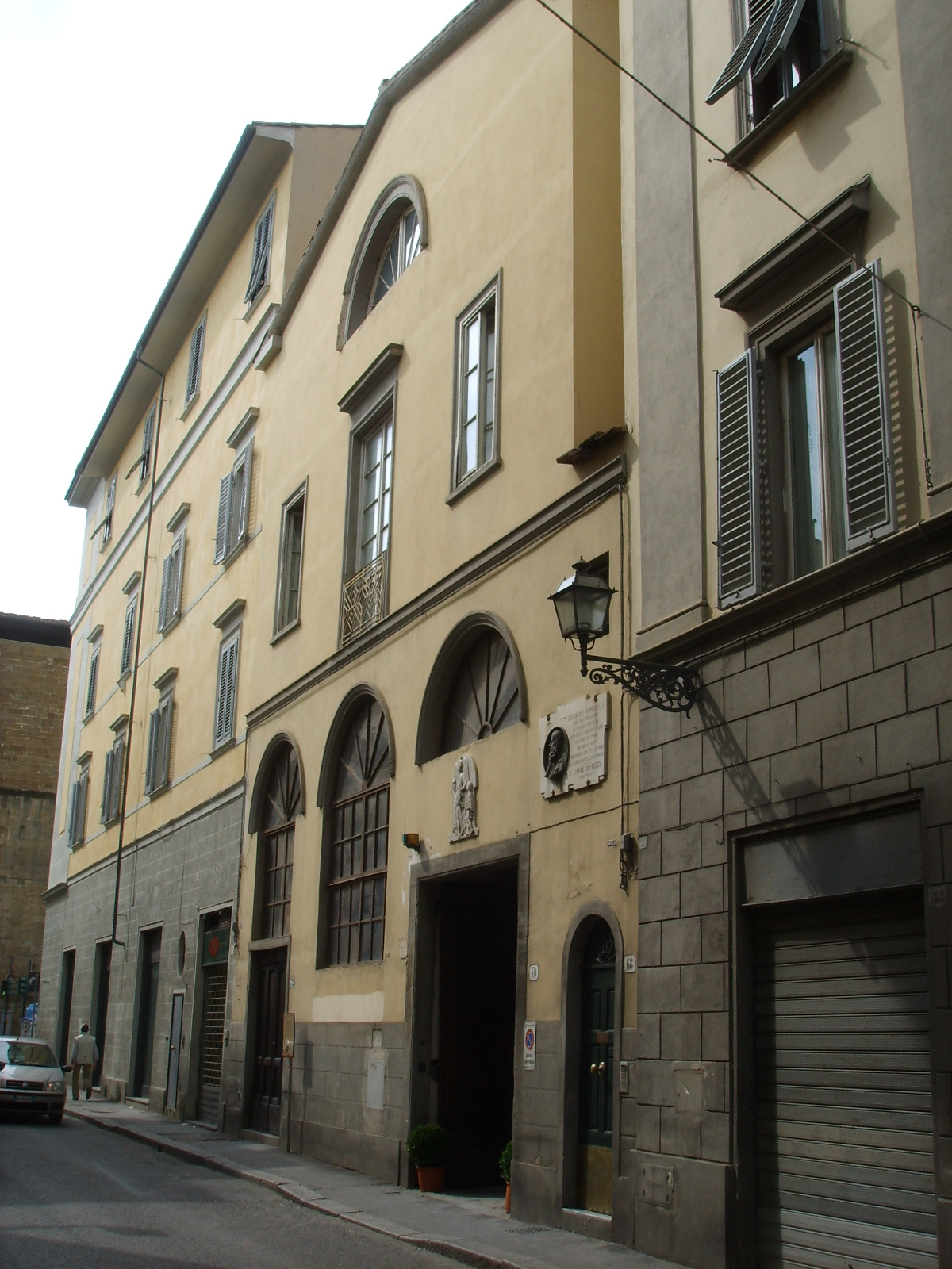 Ex-Monastero dell'Arcangelo Raffaello, oggi studio romanelli